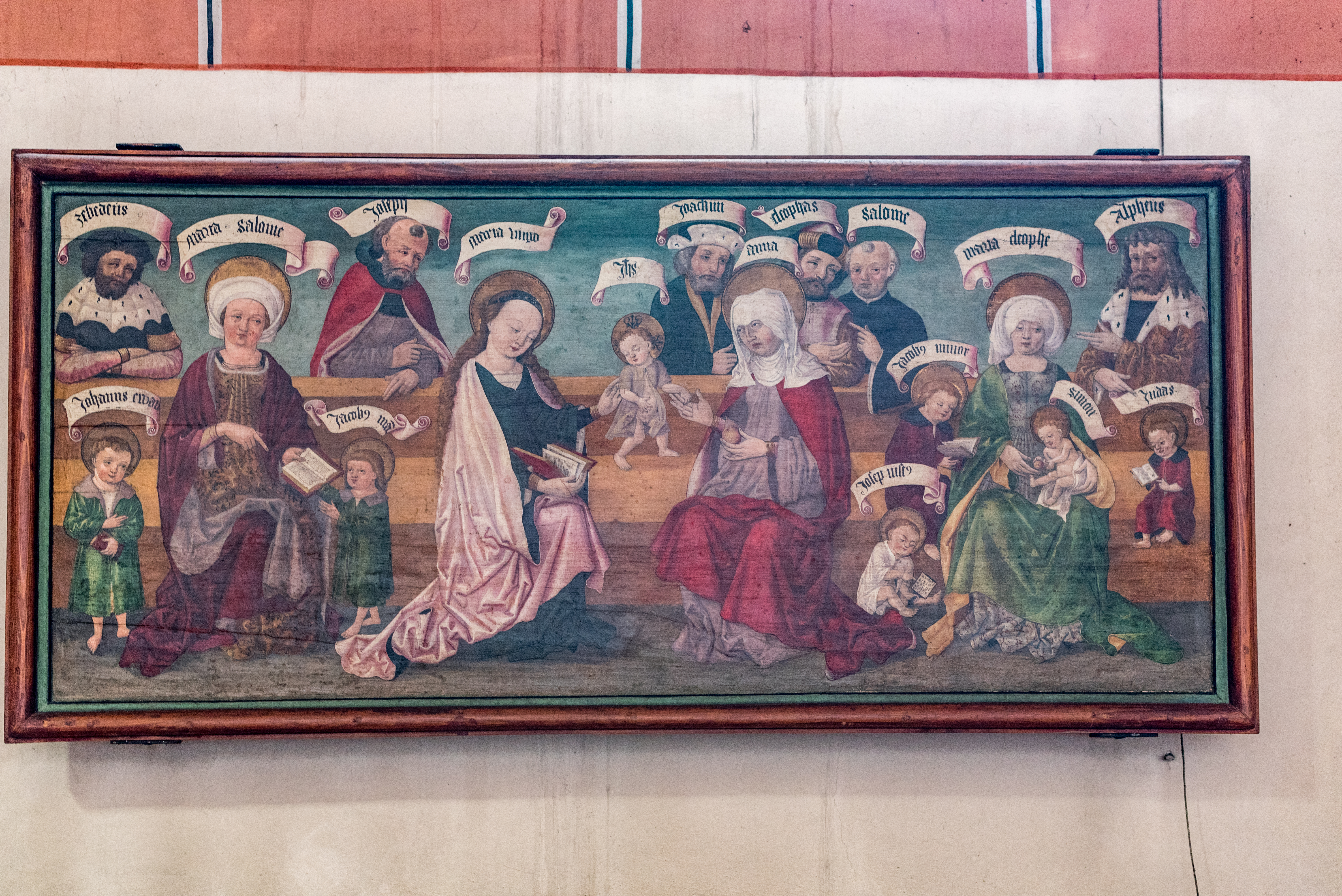 Oberwesel, Liebfrauenkirche - Die hl. Sippe, Anfang des 16. Jhs